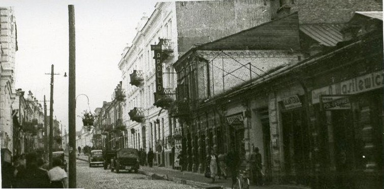 Беларуская (тарашкевіца): Вуліца Савецкая ў Гродне ў 1930 гг., дамы №№18-20 па цяперашняй нумерацыі